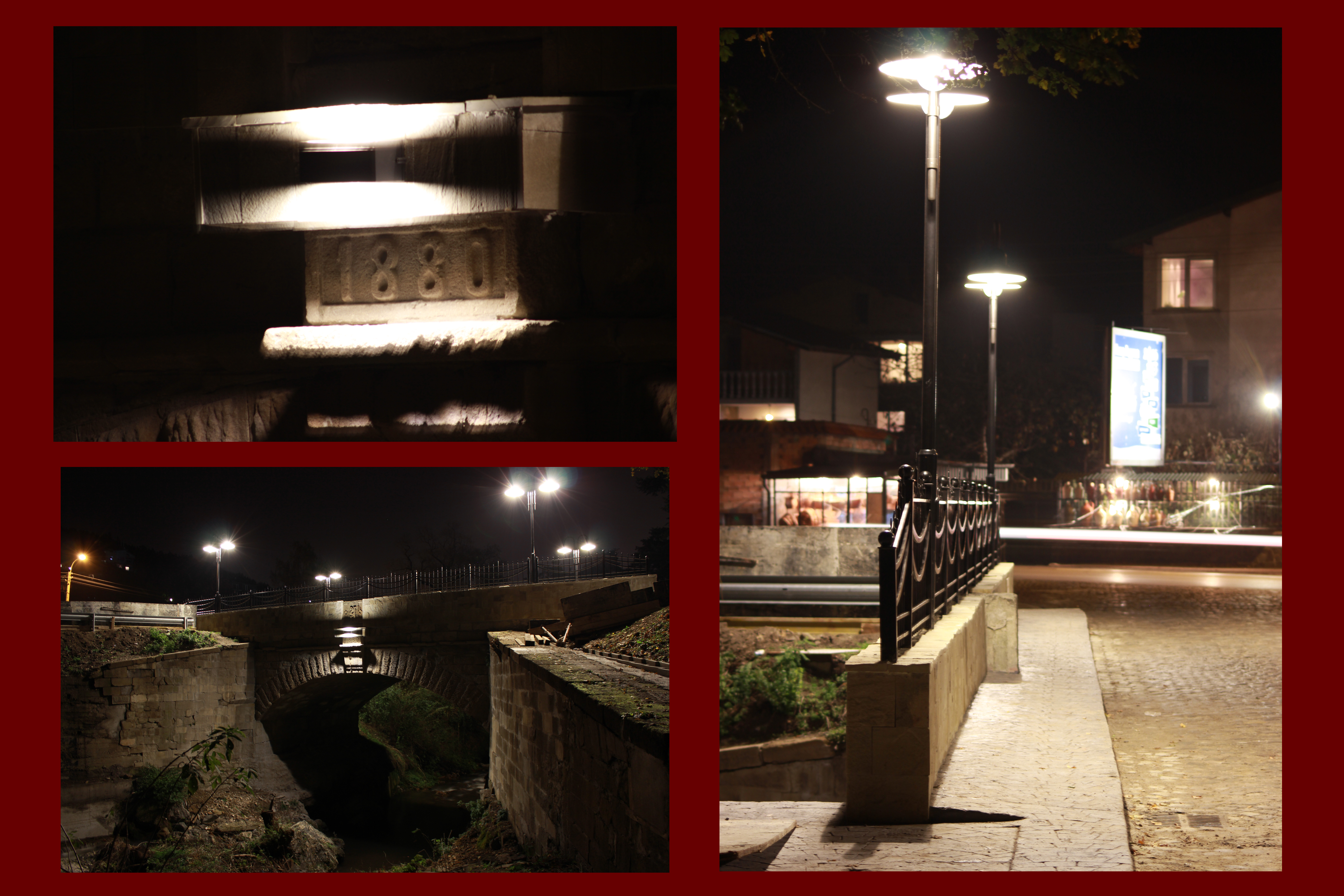 Александров мост нощем